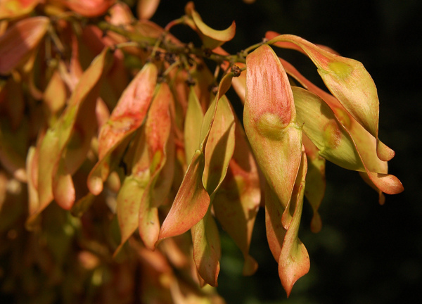 Mehr zu diesem Foto und weiteren Bäumen und Sträuchern in meinen Weblog: „Forst-Kranichstein“ bit.ly/TqDpv2 Blog-Inhalte: bit.ly/Sl95fc